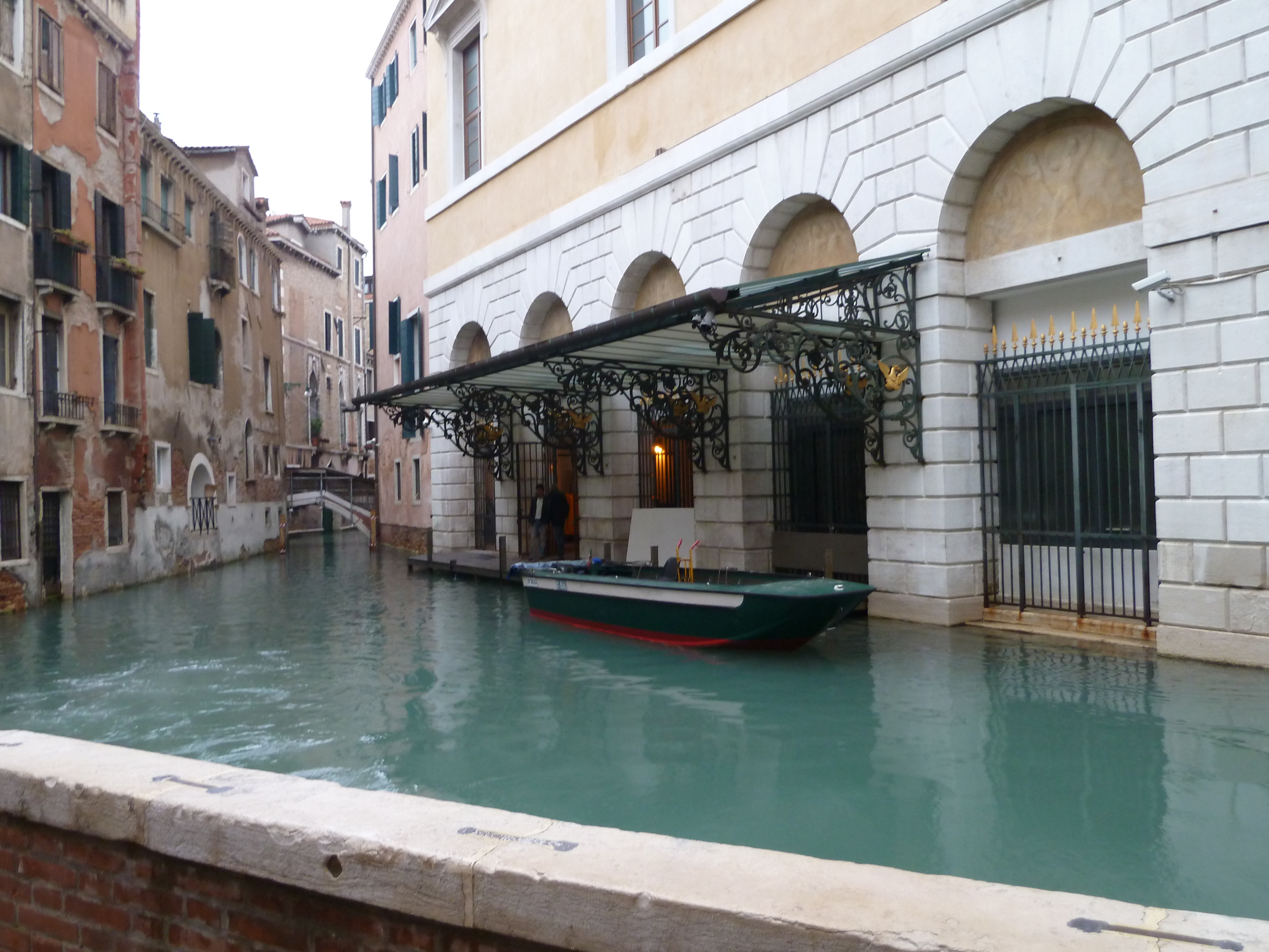 Teatro La Fenice rio de la veste